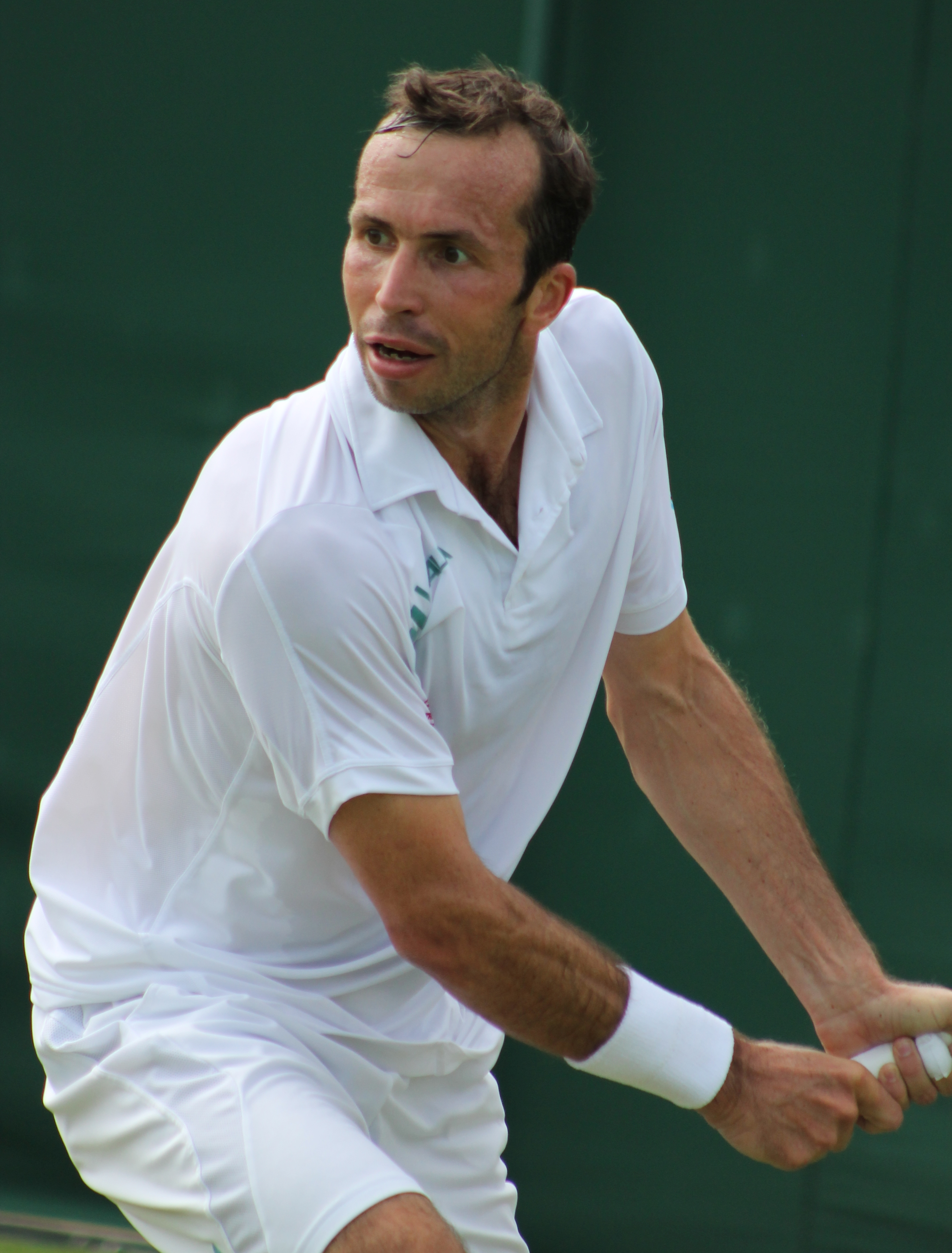 Stepanek WM14 (4)